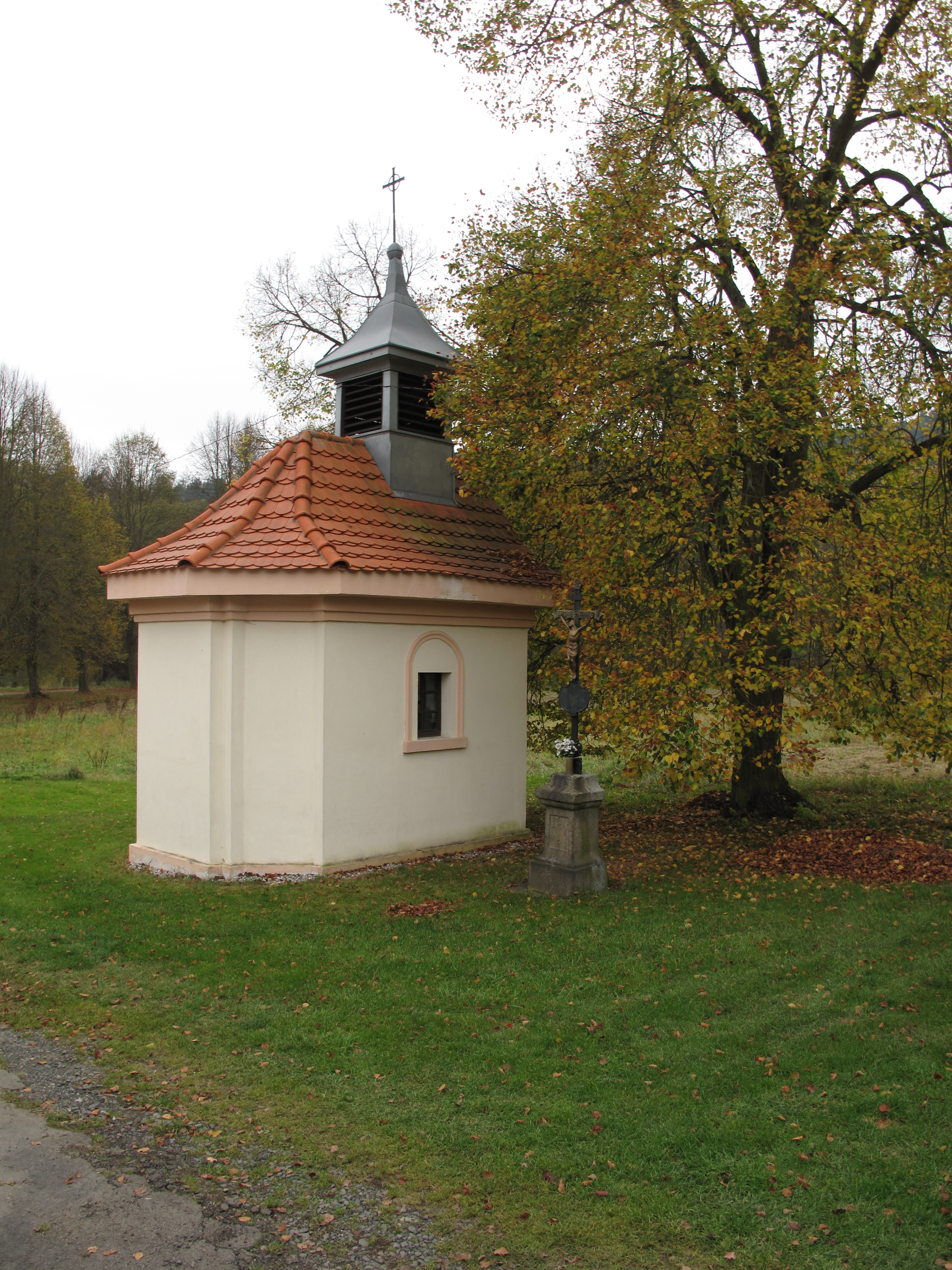 Kaplička v Čichořicích. Okres Karlovy Vary, Česká republika.